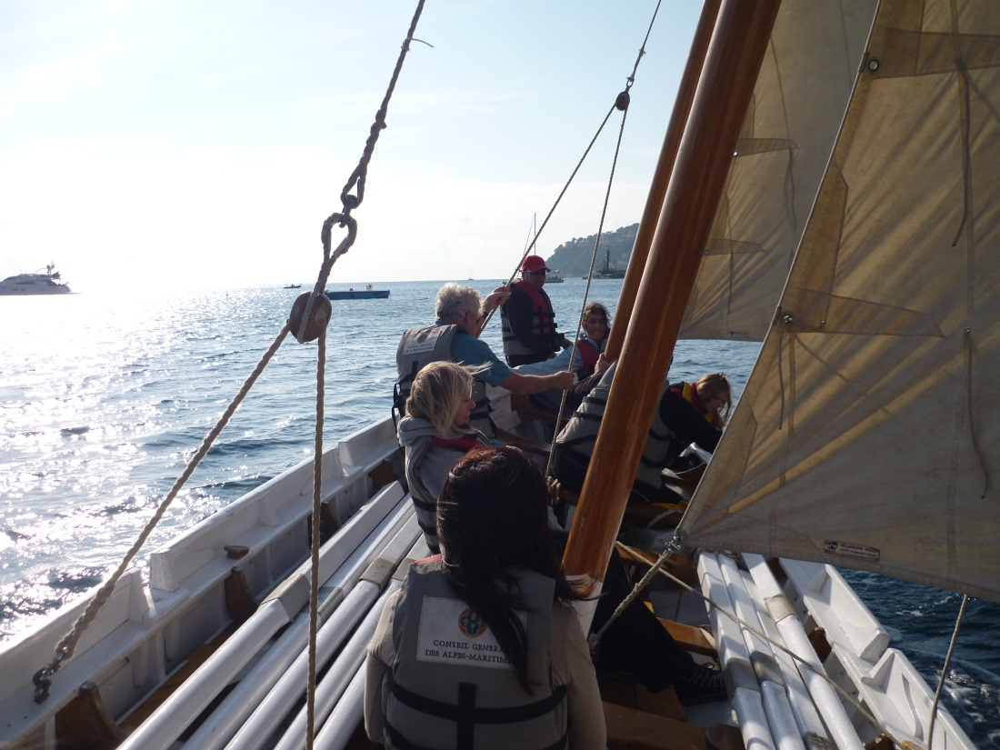 Laïssa Ana, la yole de Villefranche, à la voile dans la rade